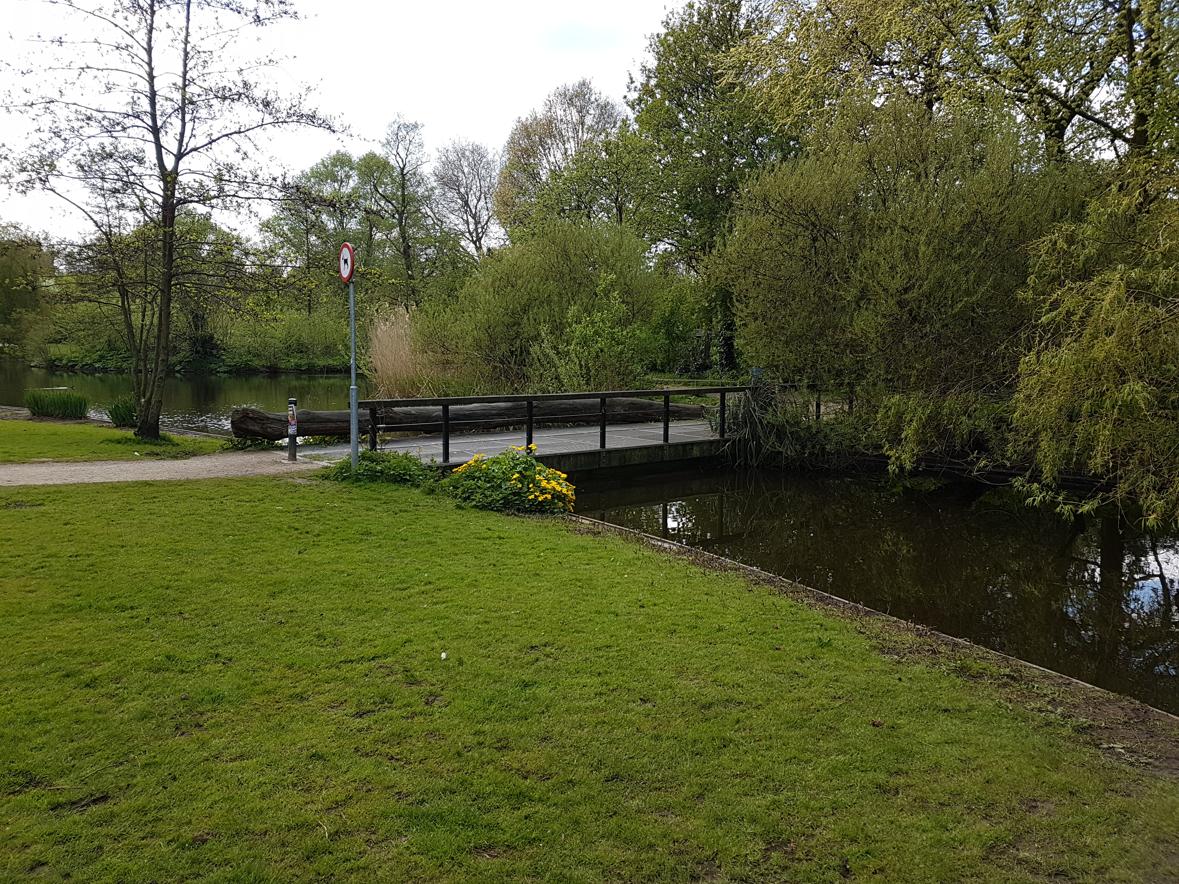 Naamloze brug in het Sarphatipark in Amsterdam De Pijp